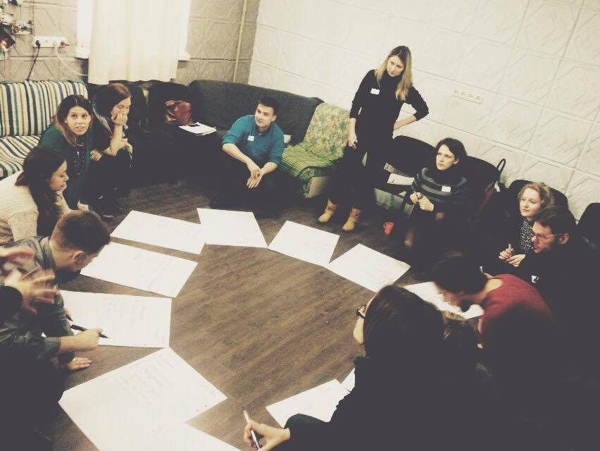 Тренинг в рамках программы "Youth:ON"